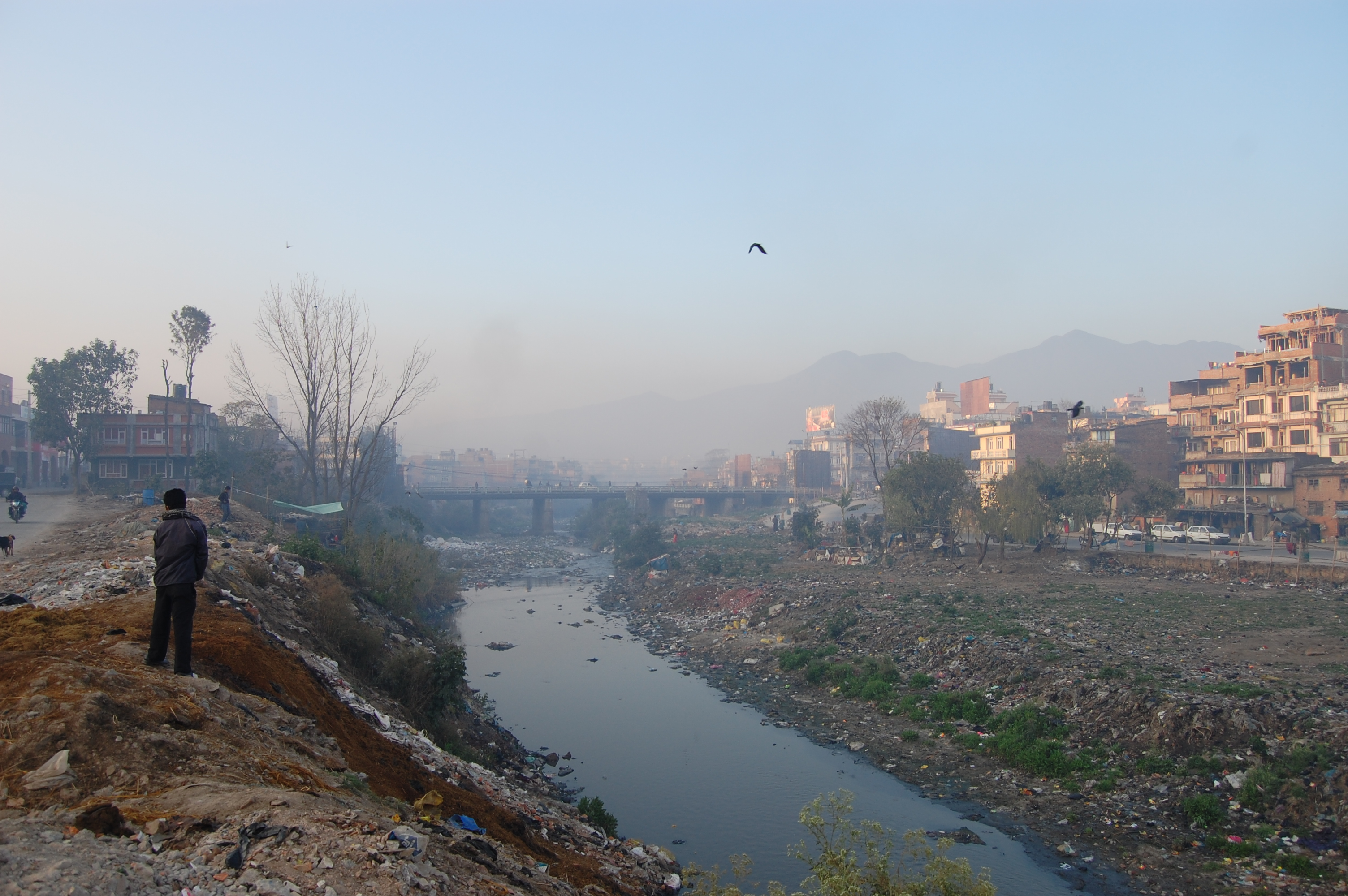 verschmutztes Kathmandu